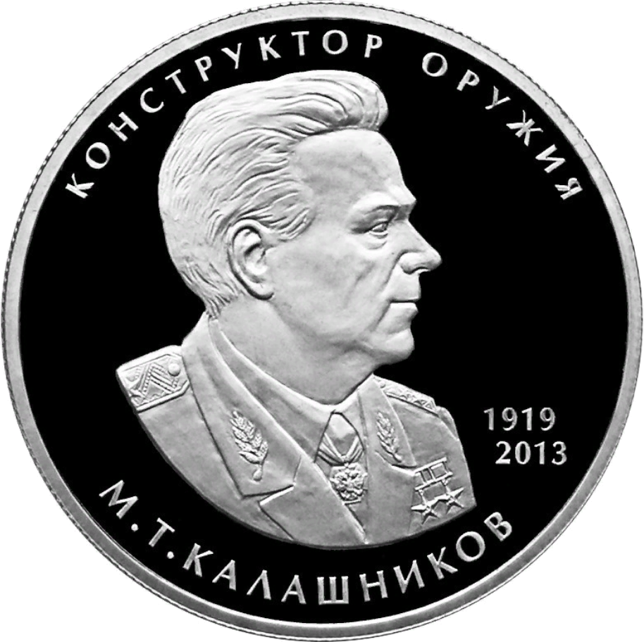 Монета Банка России, конструктор оружия М.Т. Калашников, к 100-летию со дня рождения (10.11.1919). 2 рубля, серебро, реверс, пруф. Рельефный портрет М.Т. Калашникова, по окружности надписи: вверху — «КОНСТРУКТОР ОРУЖИЯ», внизу — «М.Т. КАЛАШНИКОВ»; справа — годы жизни конструктора в две строки: «1919» и «2013». Чеканка — Санкт-Петербургский монетный двор. Художник: О.Г. Шепель. Скульптор: О.Г. Шепель.